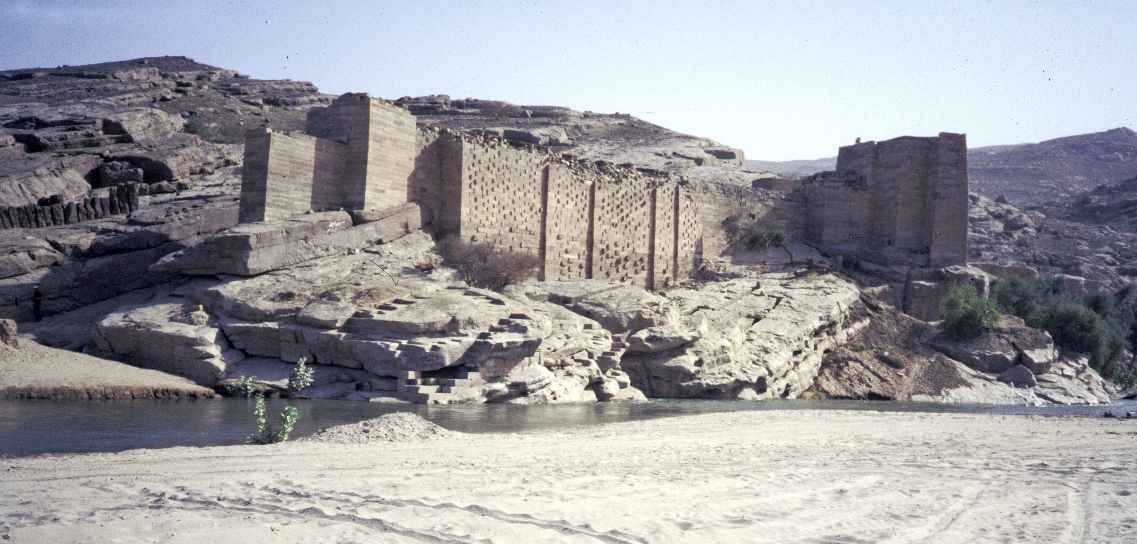 Yemen